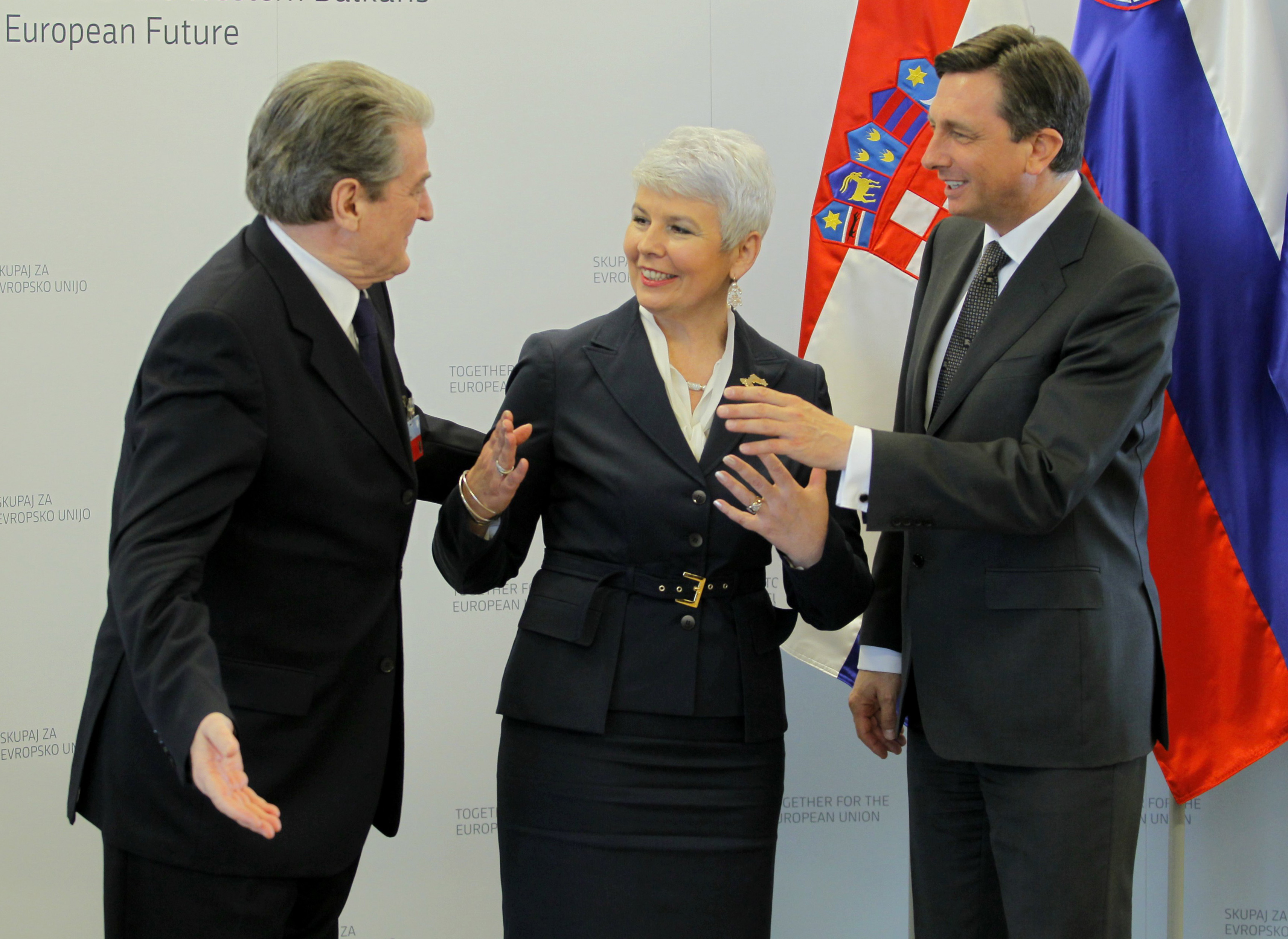 Sali Berisha, Jadranka Kosor in Borut Pahor